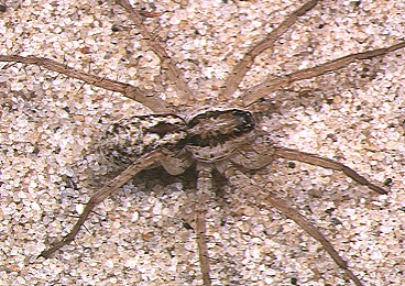 female Pardosa takahashii from Okinawa.